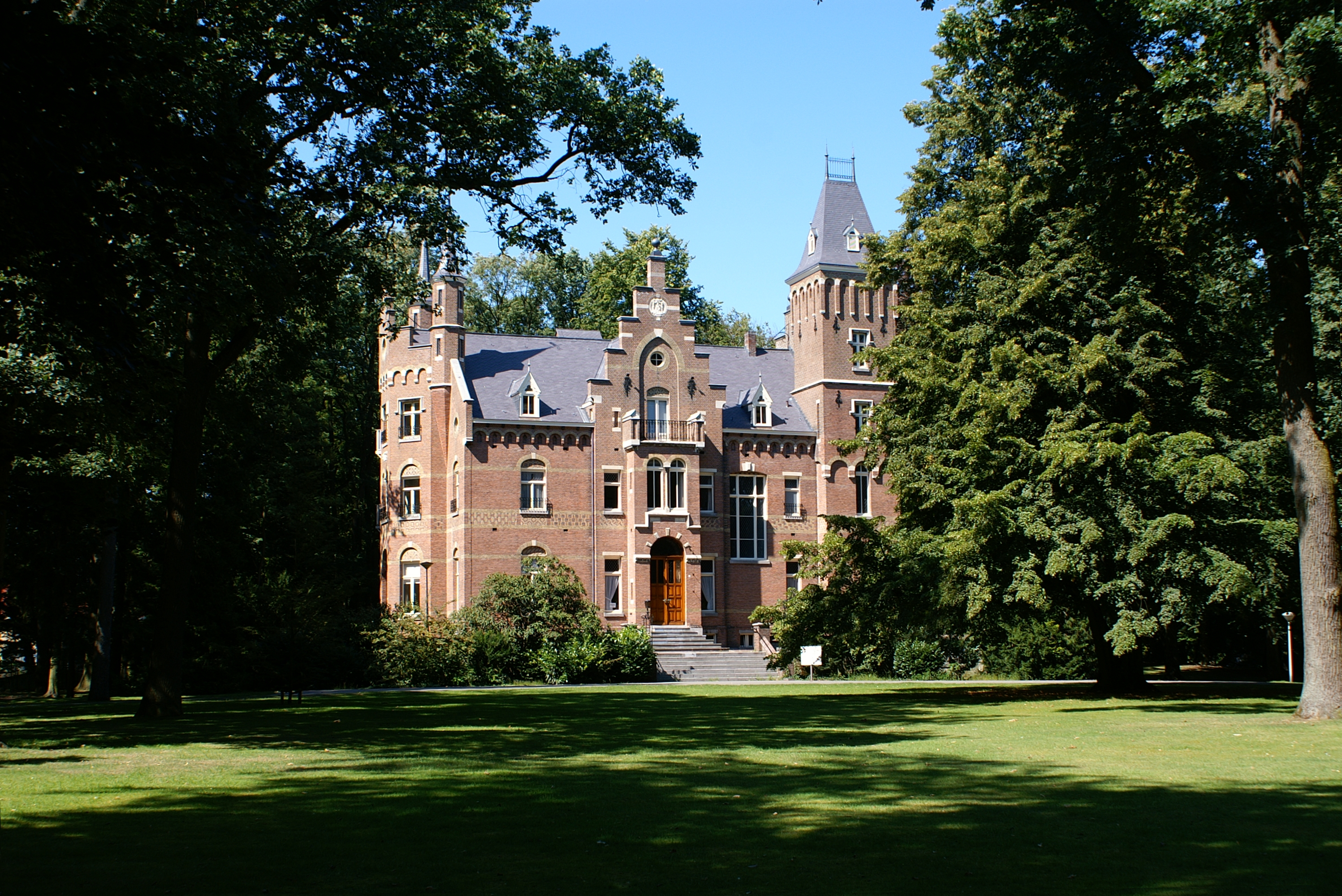 Huize Roucouleur te Vught.